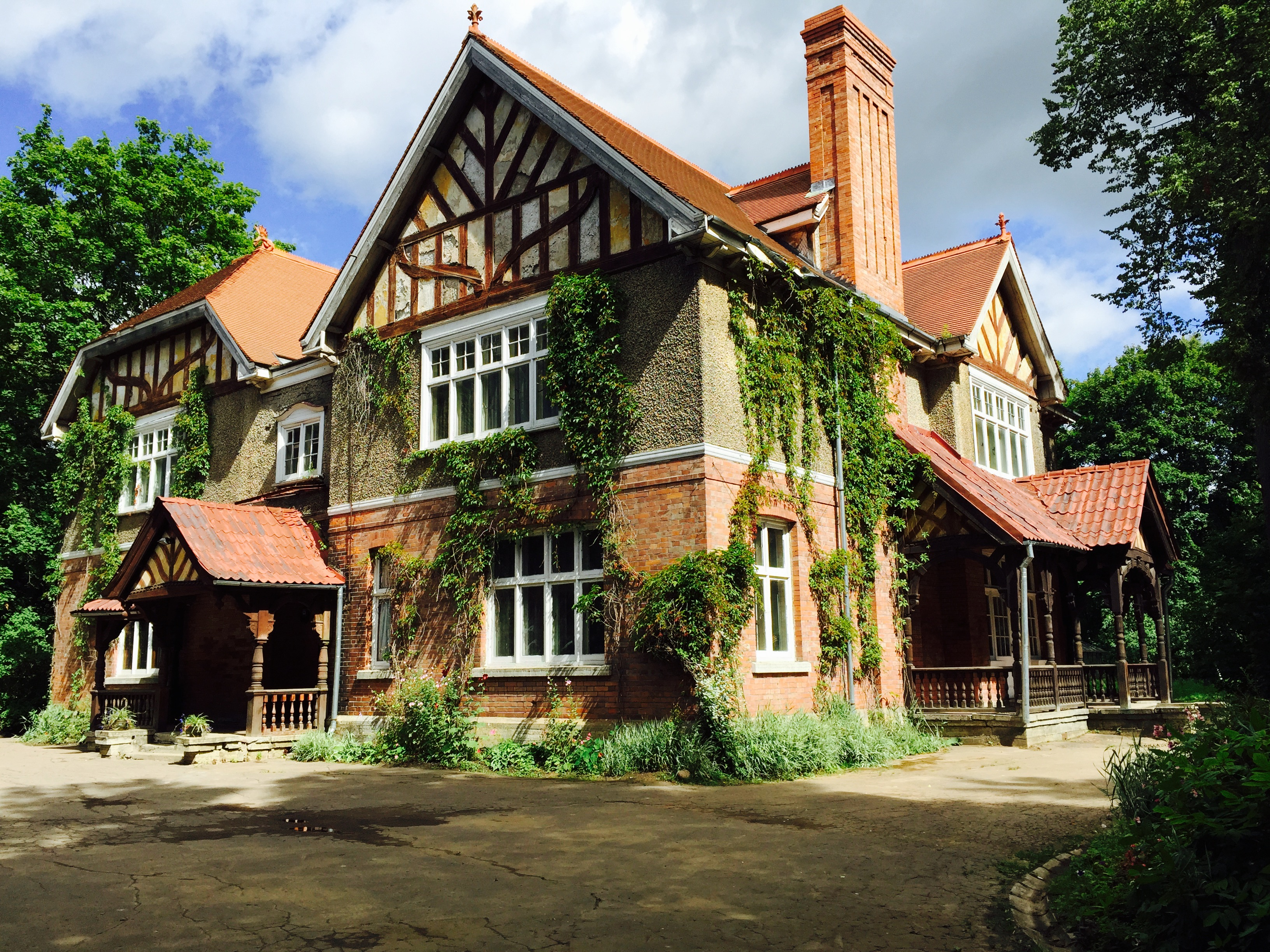 Дача Великого князя Бориса Владимировича: Московское шоссе, 11, Пушкин, Пушкинский район, Санкт-Петербург